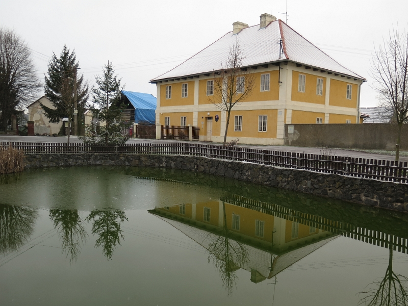 Fara (Vidim), Vidim 4, Vidim.